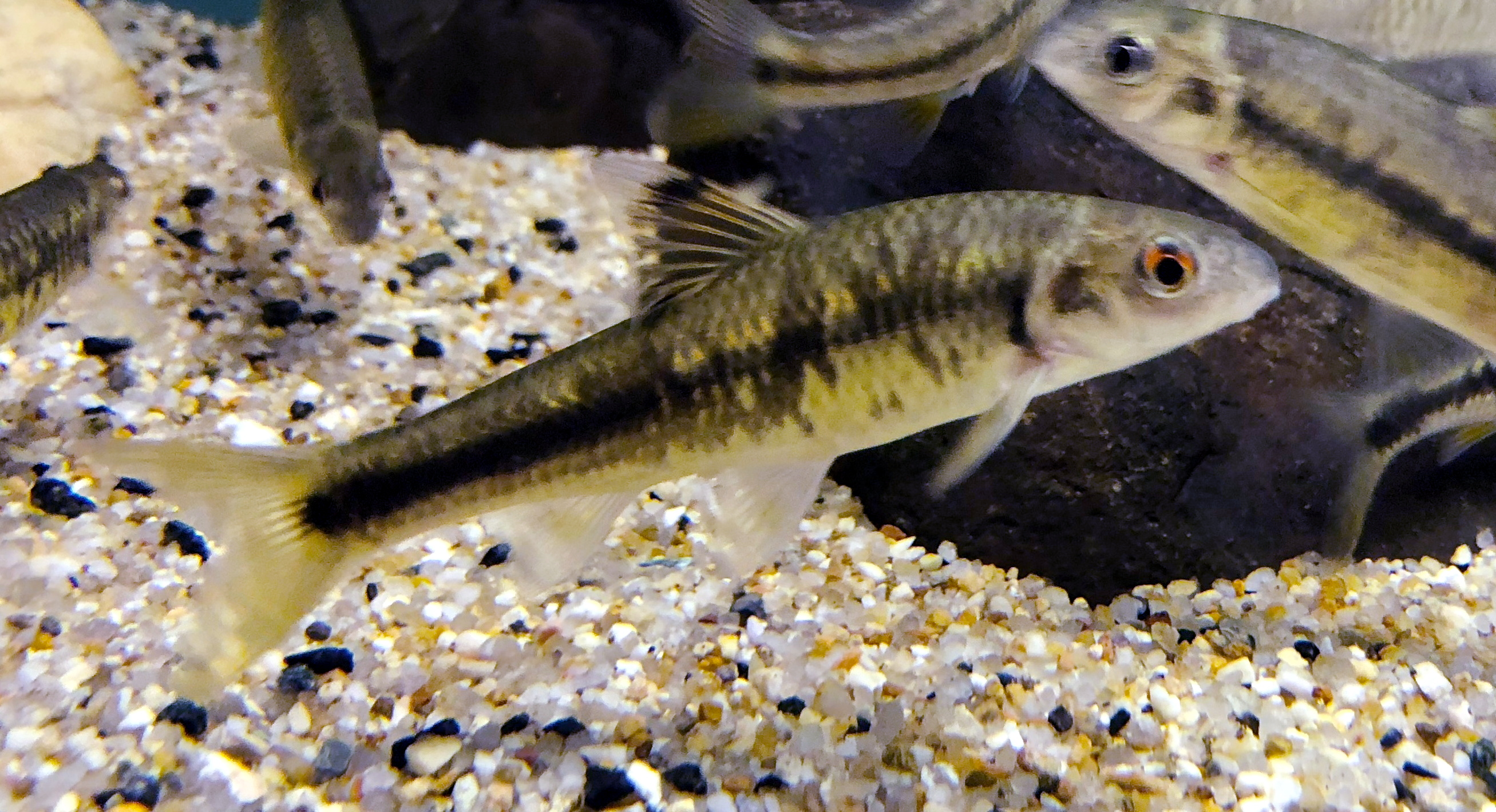 カワヒガイ。滋賀県立琵琶湖博物館飼育展示個体。